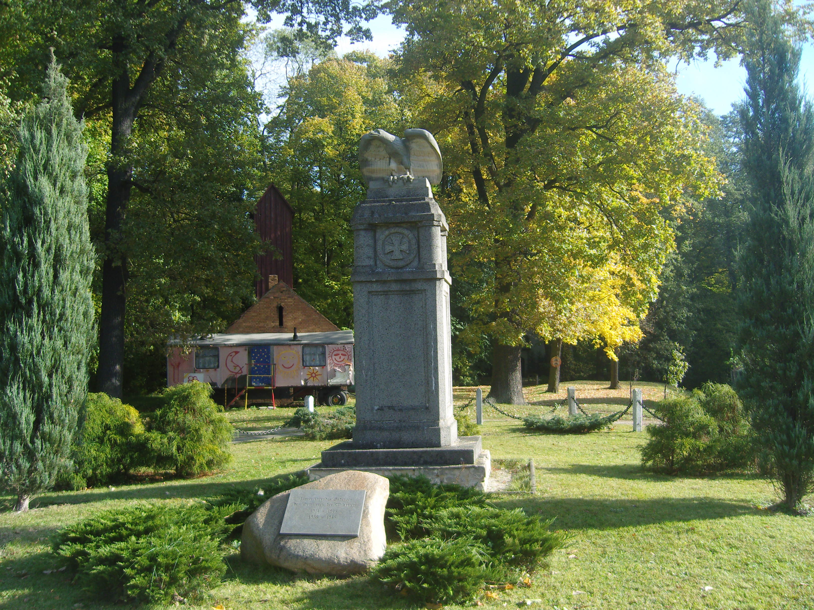 Kriegerdenkmal für die Gefallenen des Ersten Weltkriegs in Reddern